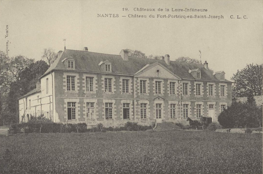 Nantes - Château du Fort-Portricq-en-Saint-Joseph